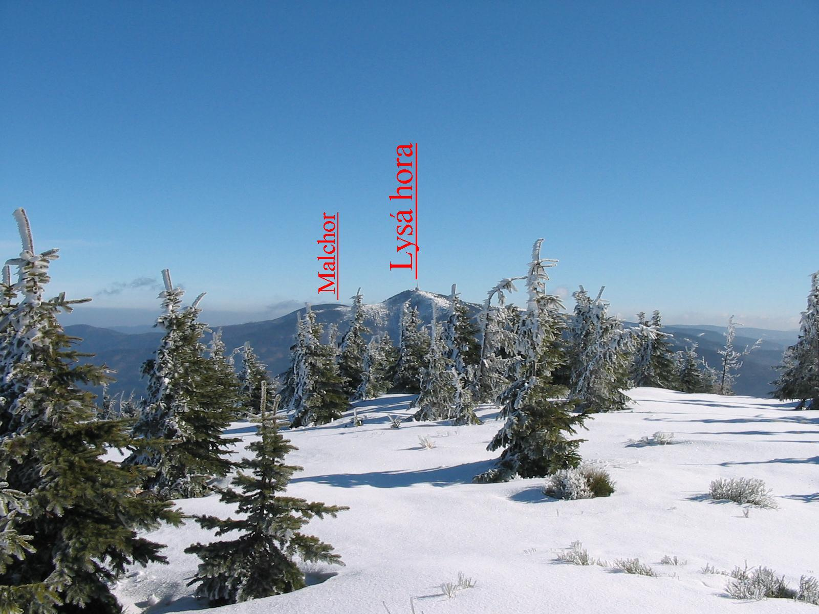 Masív Lysé hory z Malého Smrku